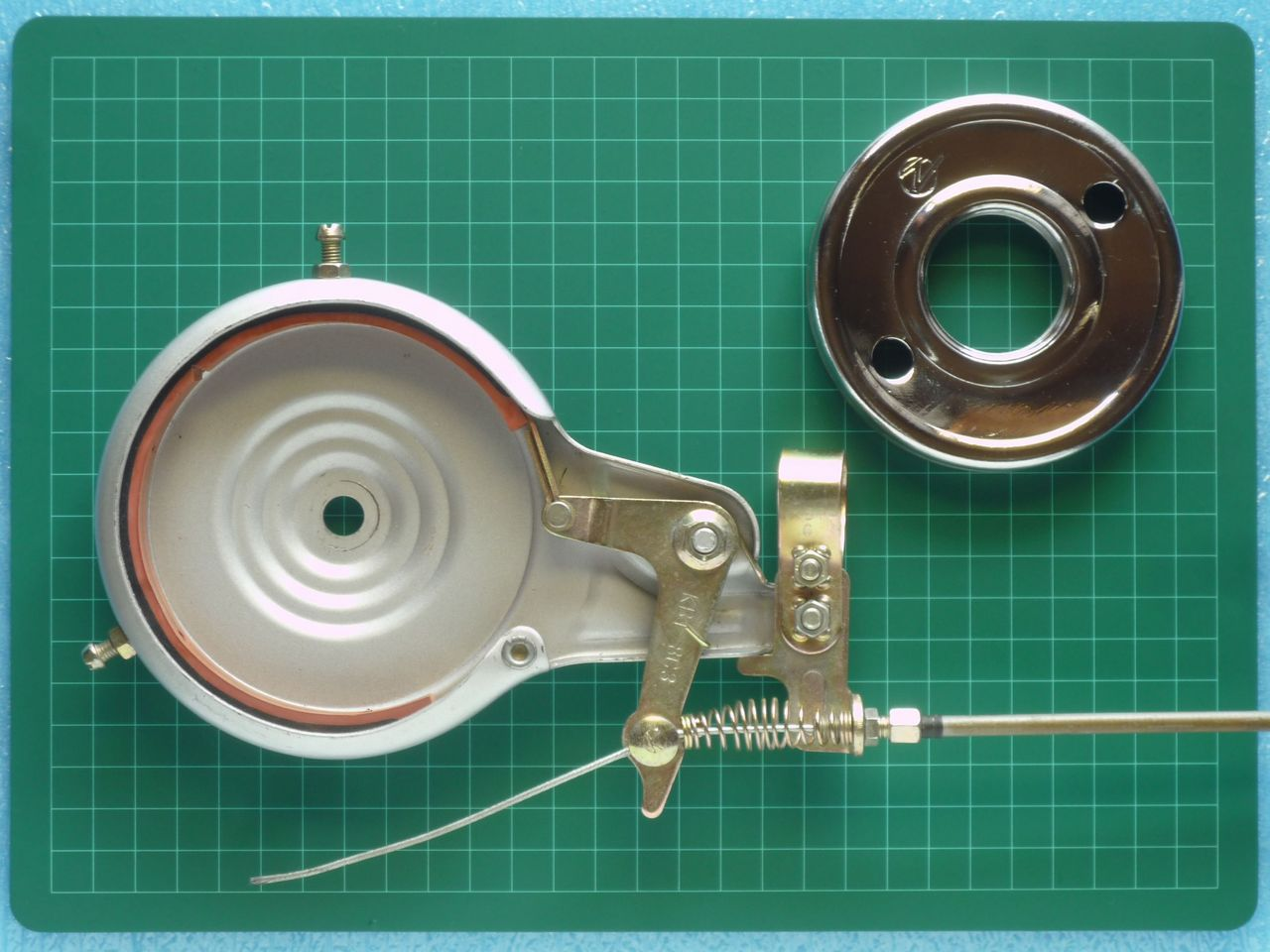 自転車後輪用ブレーキ バンドブレーキ 裏面内部